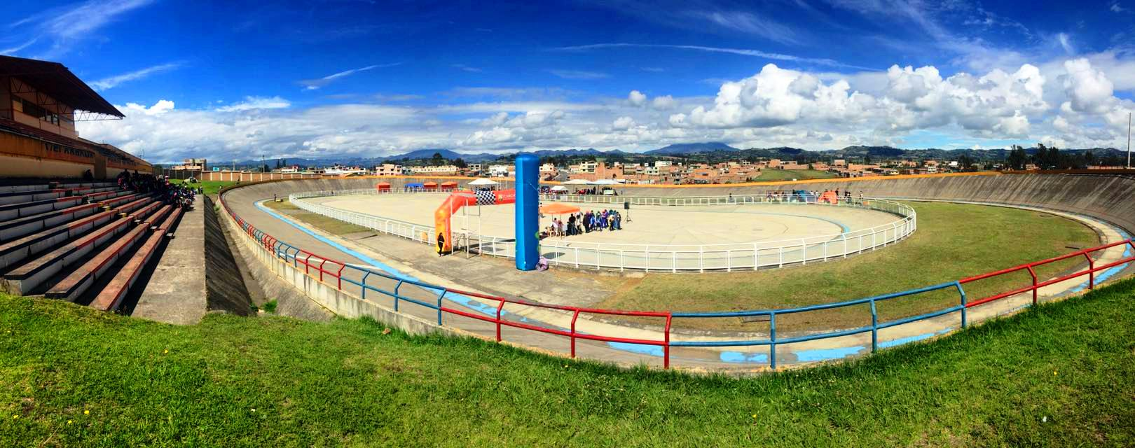 Velódromo Ciudad de Tulcán, 2016